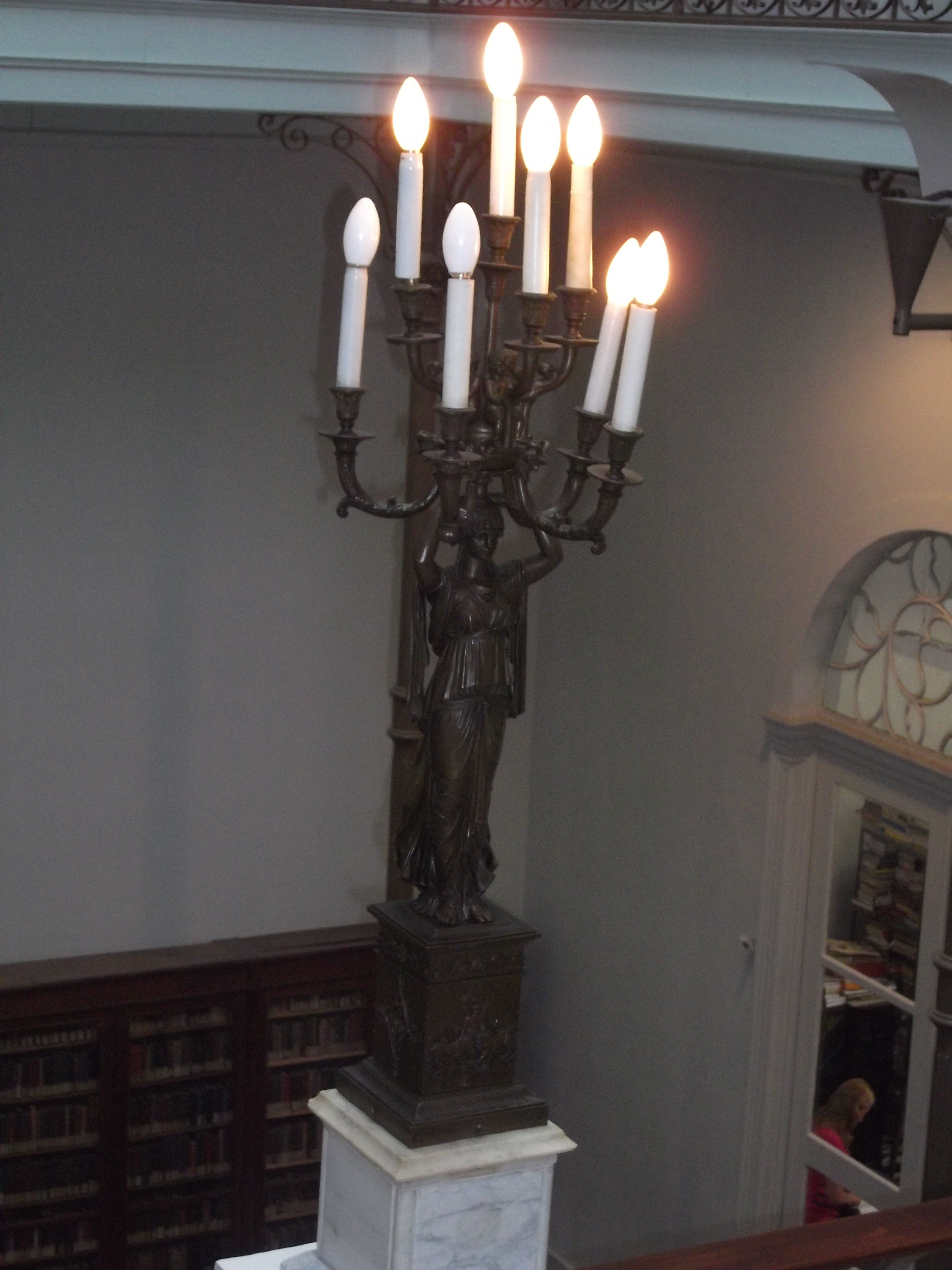 Biblioteca Pública de Pelotas, Brasil